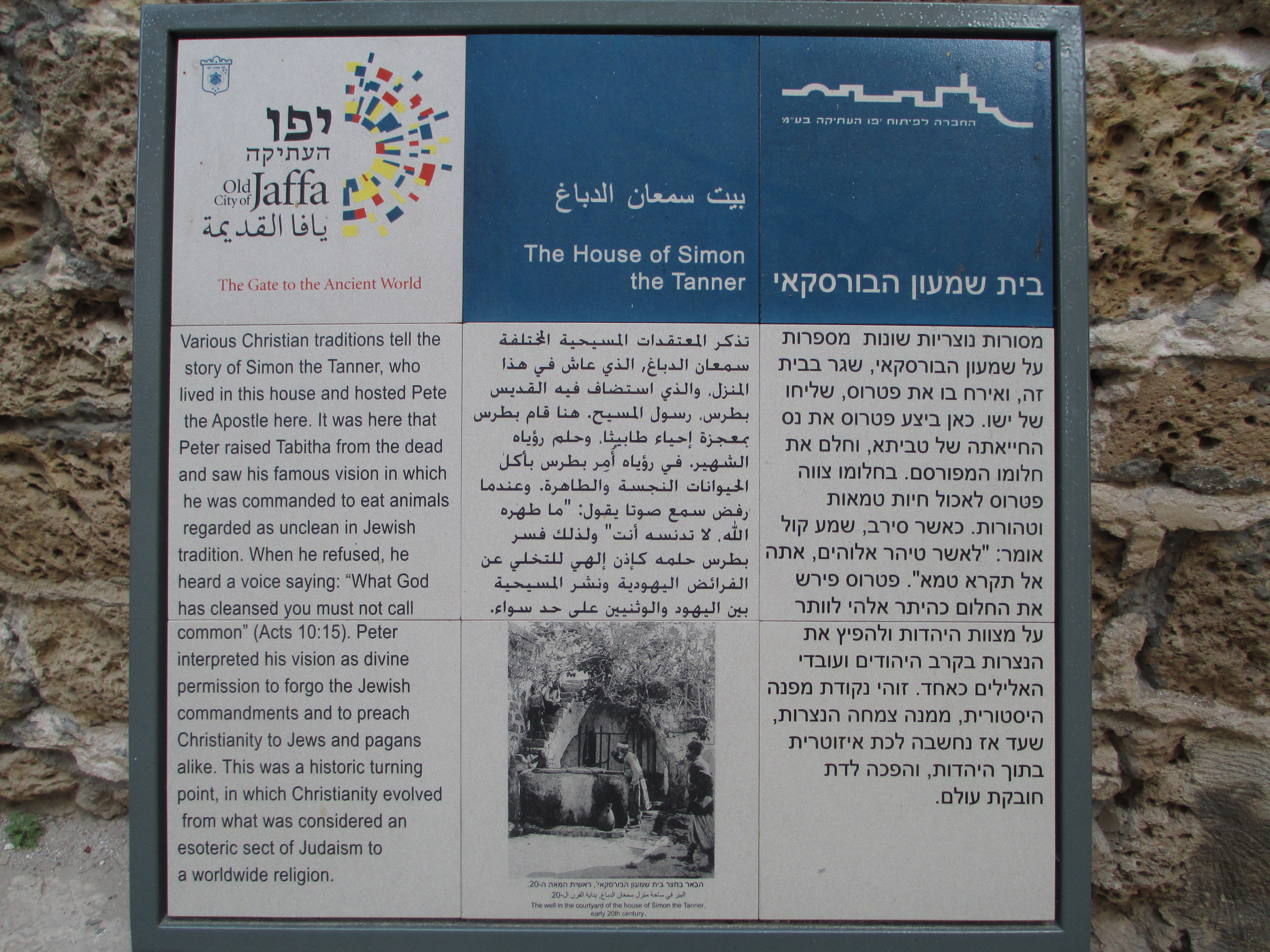 שלט הסבר על ביתו של שמעון הבורסקאי ביפו העתיקה